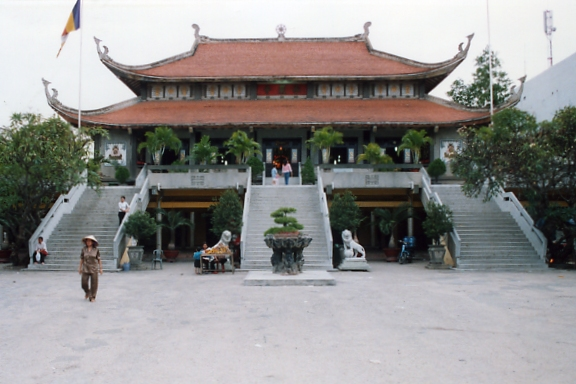 Chùa Vĩnh Nghiêm, Thành phố Hồ Chí Minh, 2005. Hình này do Phan Ba tự chụp vào tháng 11 năm 2005 và đưa vào phạm vi công cộng.